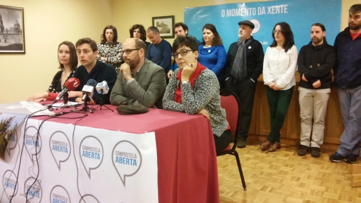 Comparecencia de Compostela Aberta ante a prensa.